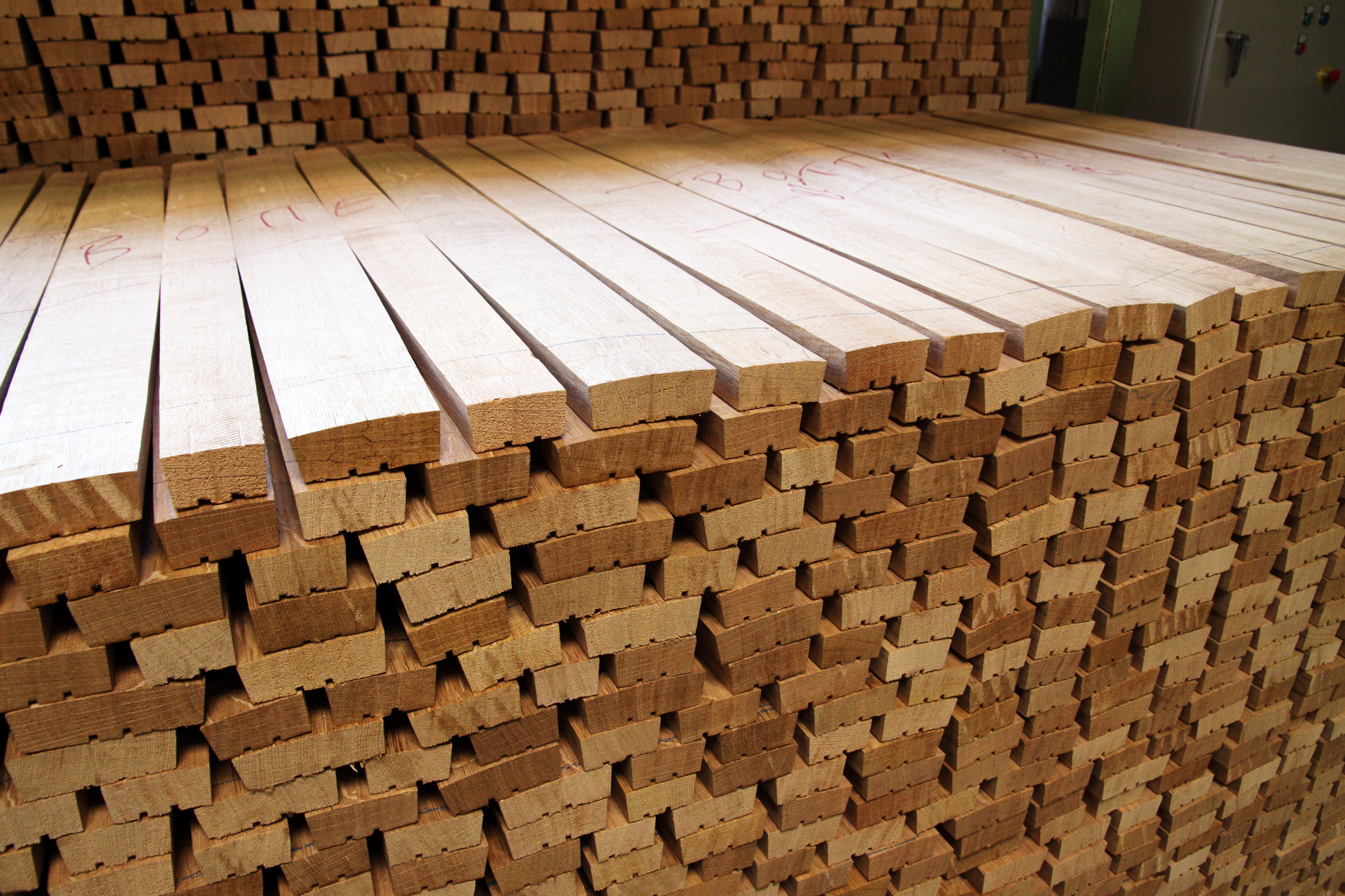 Empilement de douelles